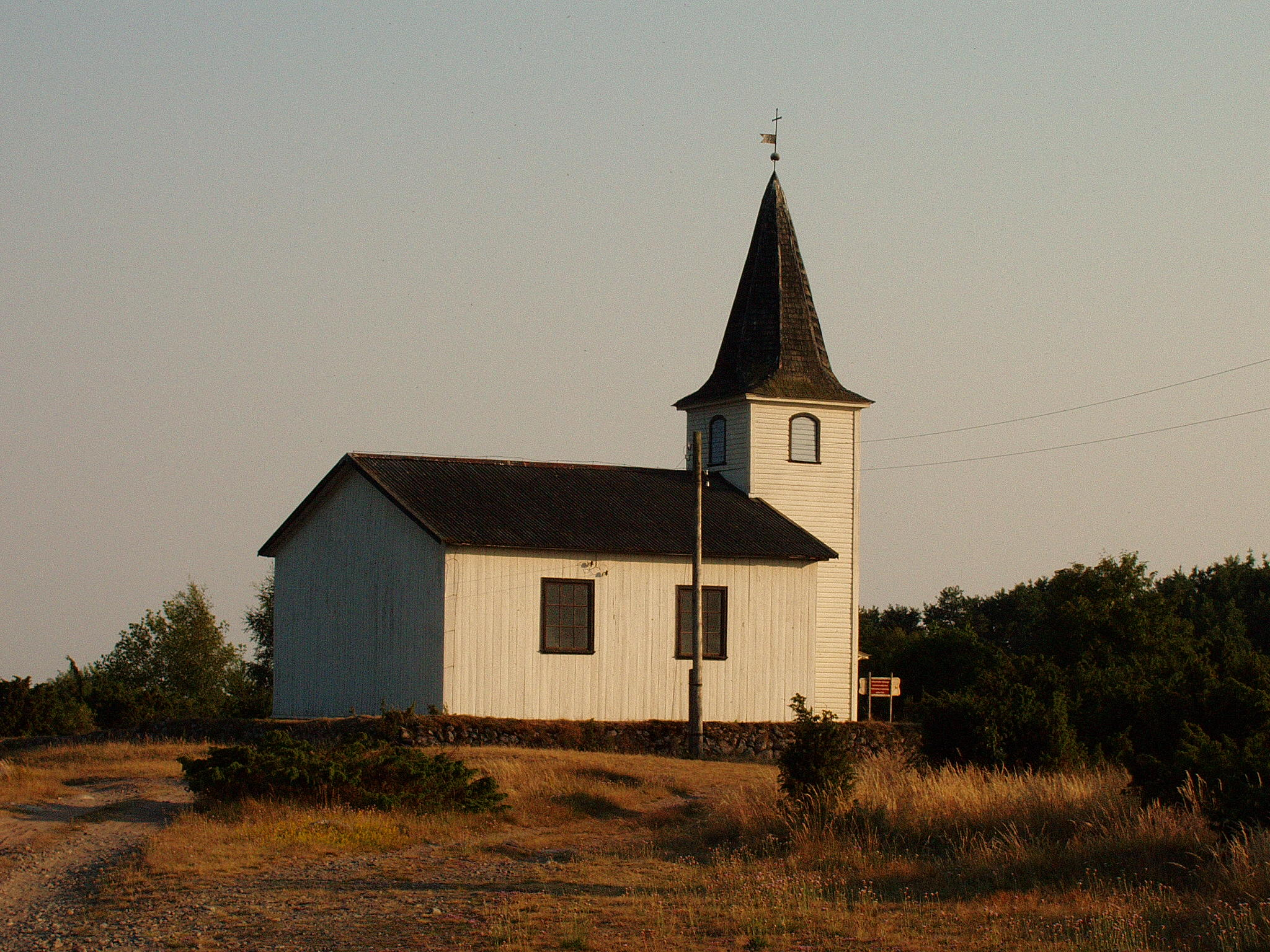 Prangli kirik